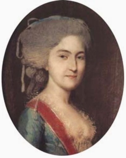 Анна Никитична Нарышкина (1730-1820), урожденная Румянцева, дочь Н. И. Румянцева от брака с М. В. Мещерской. С 1749 жена А. А. Нарышкина (1726-1795).